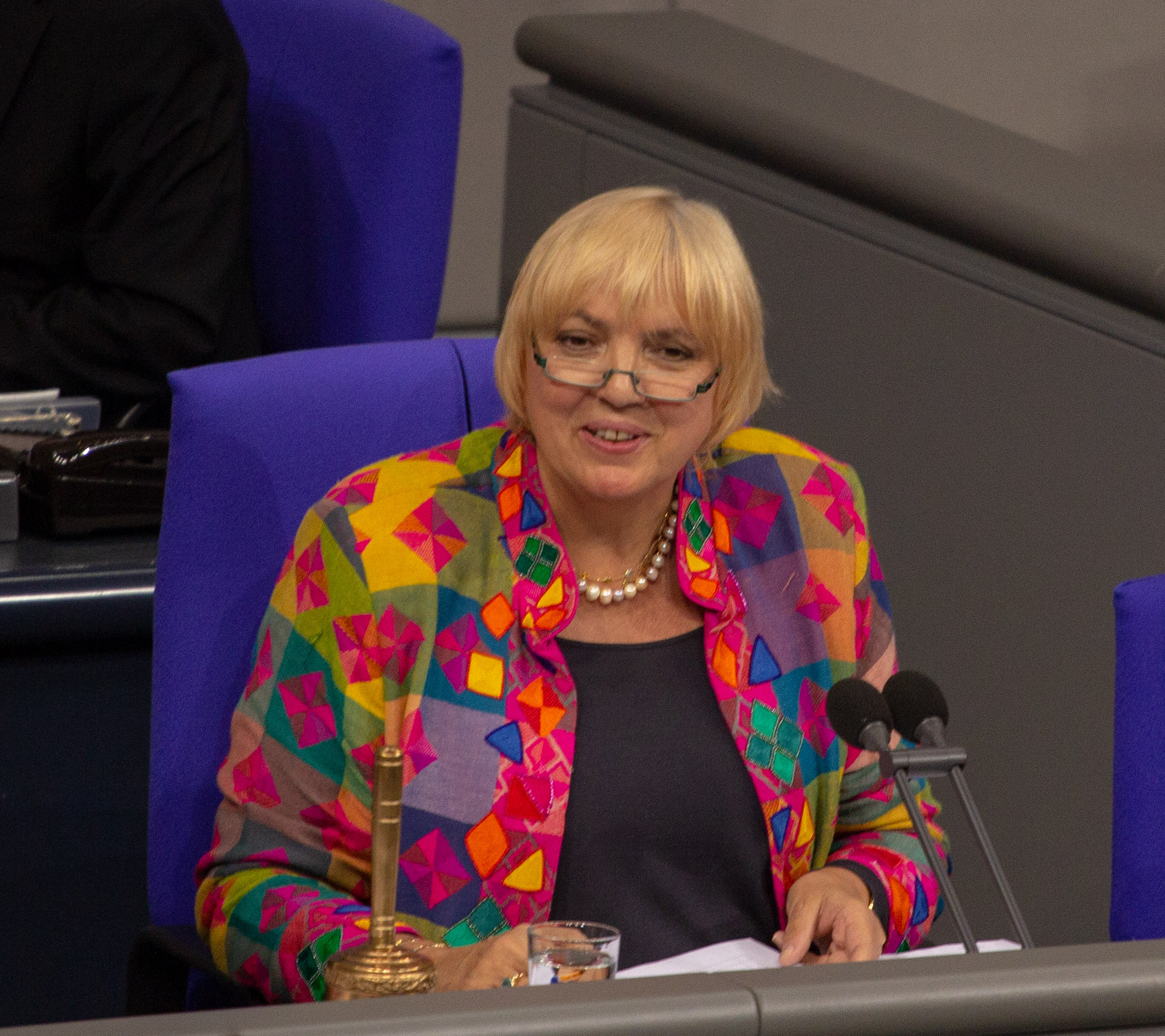 Claudia Roth, Mitglied des Deutschen Bundestages, während einer Plenarsitzung am 11. April 2019 in Berlin.